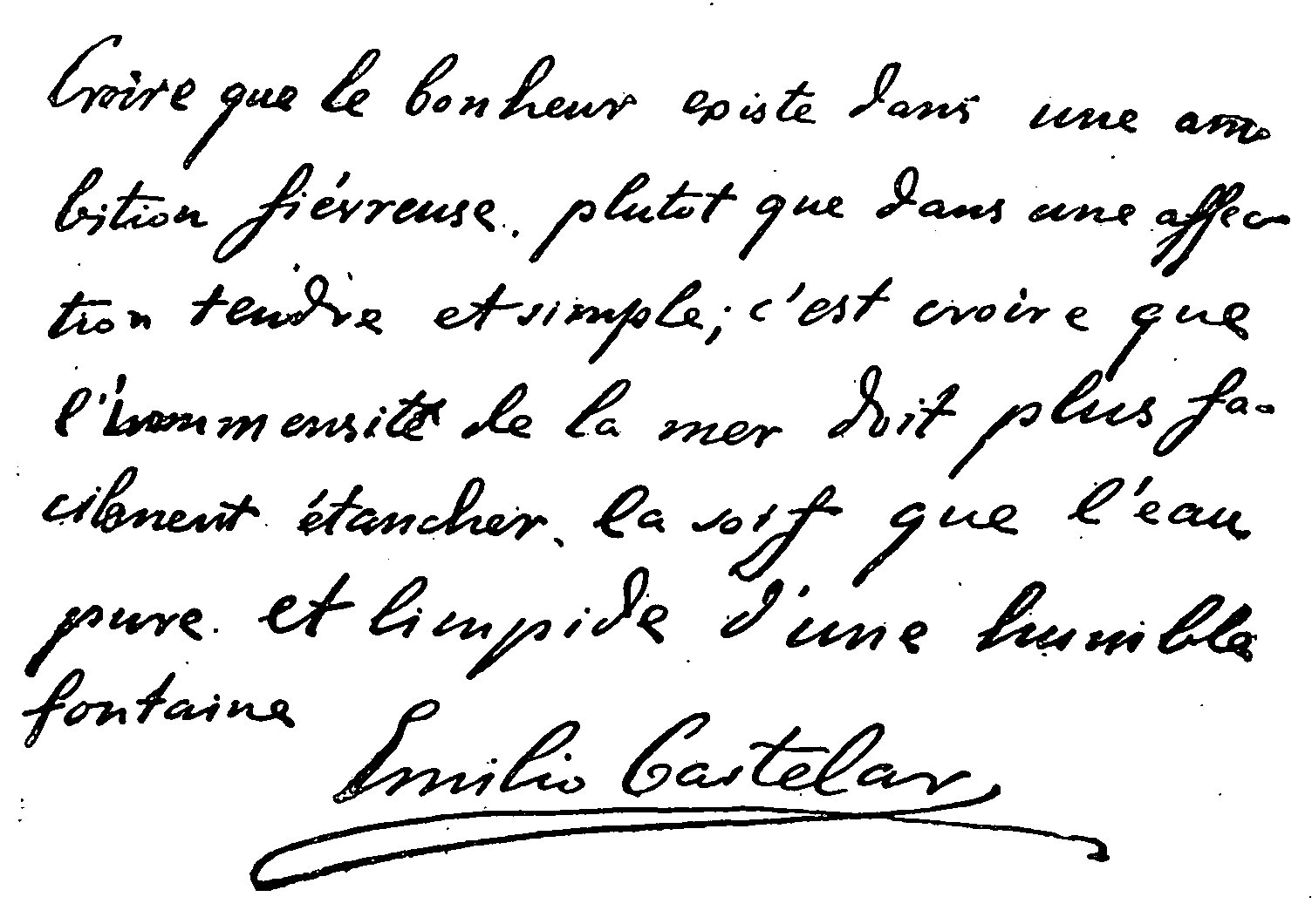 Autographe d'Emilio Castelar : Croire que le bonheur existe dans une ambition fiévreuse plutôt que dans une affection tendre et simple, c'est croire que l'immensité de la mer doit plus facilement étancher la soif que l'eau pure et limpide d'une humble fontaine. Emilio Castelar